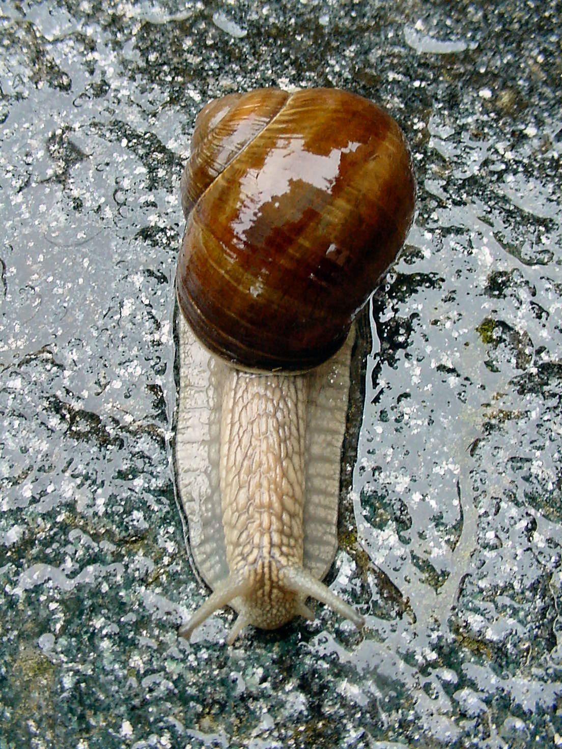 Chiocciola in movimento: visibili i quattro tentacoli del capo. Lumbaart: La lümaga. Vèneto: Sciùs.